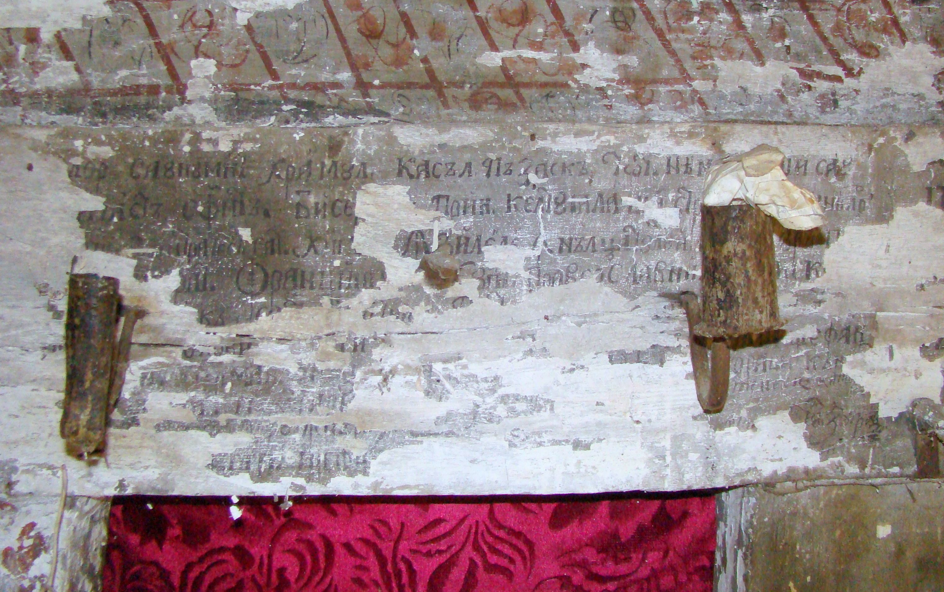 Biserica de lemn "Sfinții Arhangheli Mihail şi Gavriil" din Hida, județul Săla